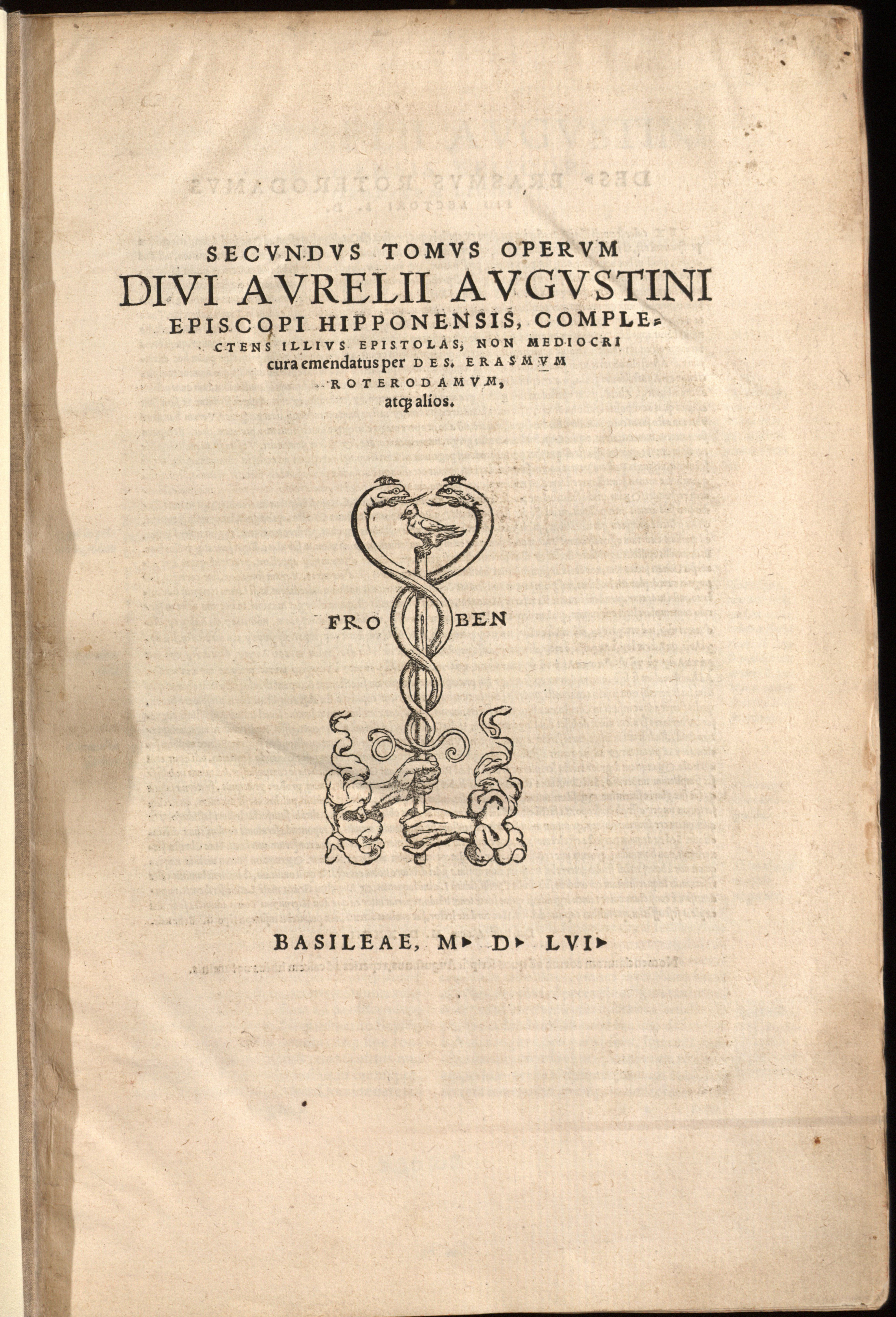 Johannes Frobenius-kiadvány címlapja